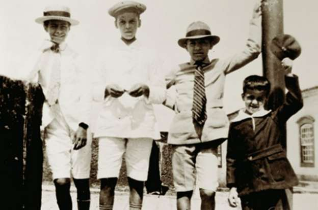 Tancredo Neves ao lado dos amigos Carlos Raton, Belisário Leite e Nelson Raton (Tancredo é o primeiro da esquerda). São João del-Rei, década de 1910.